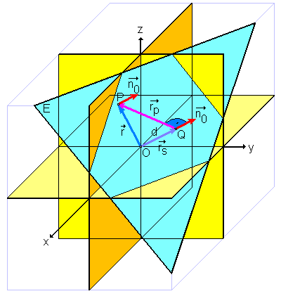 Zur Hesse-Normalform der Ebenengleichung